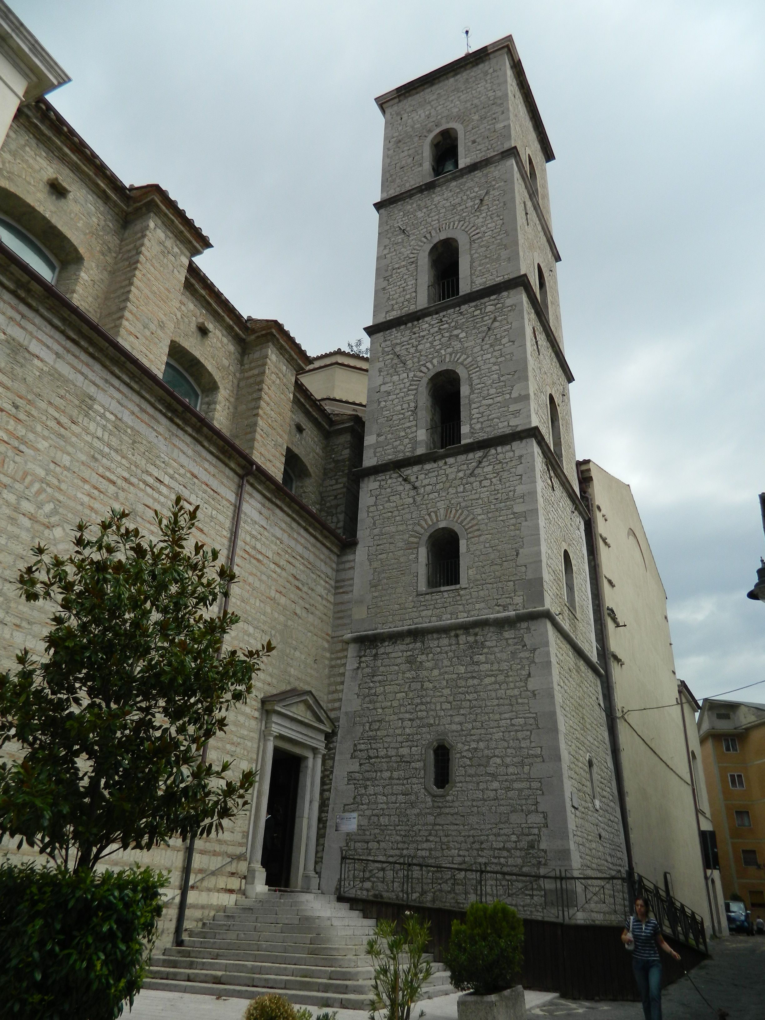 Cattedrale di San Gerardo (Potenza) - Campanile